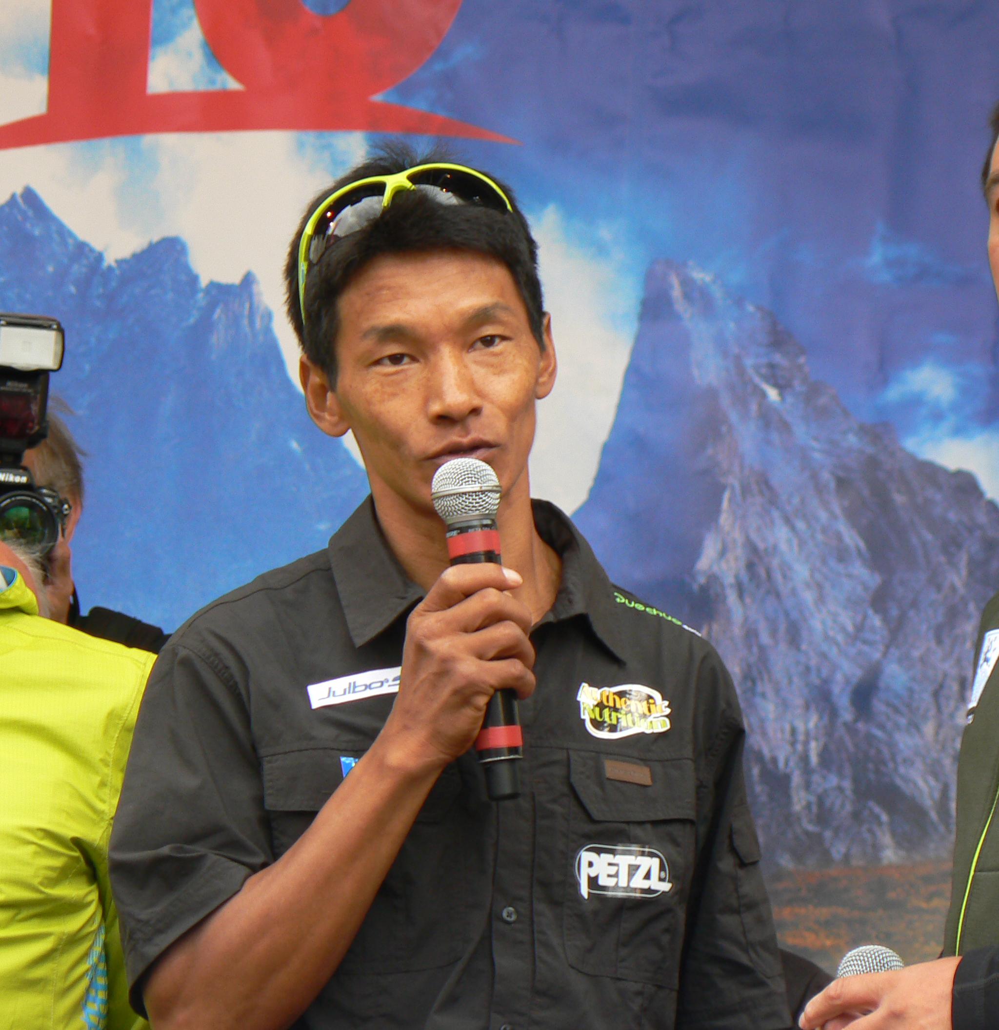 Premiazione dei vincitori della quarta edizione della TDS -Traces des Ducs de Savoie, Ultra-Trail du Mont-Blanc 2012. Dewa Sherpa ha vinto, seguito da Lionel Trivel e Antoine Guillon.